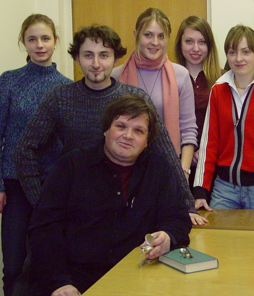 Левандовский, Андрей Анатольевич